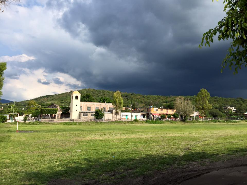 Chulada de pueblo